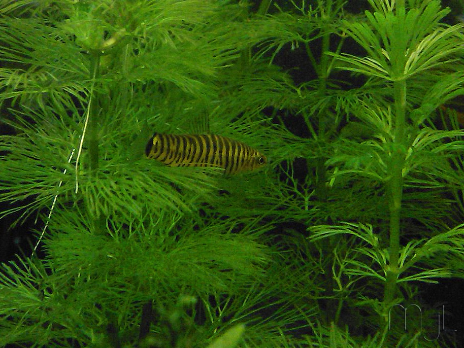 Zwerg-Tigerschmerle